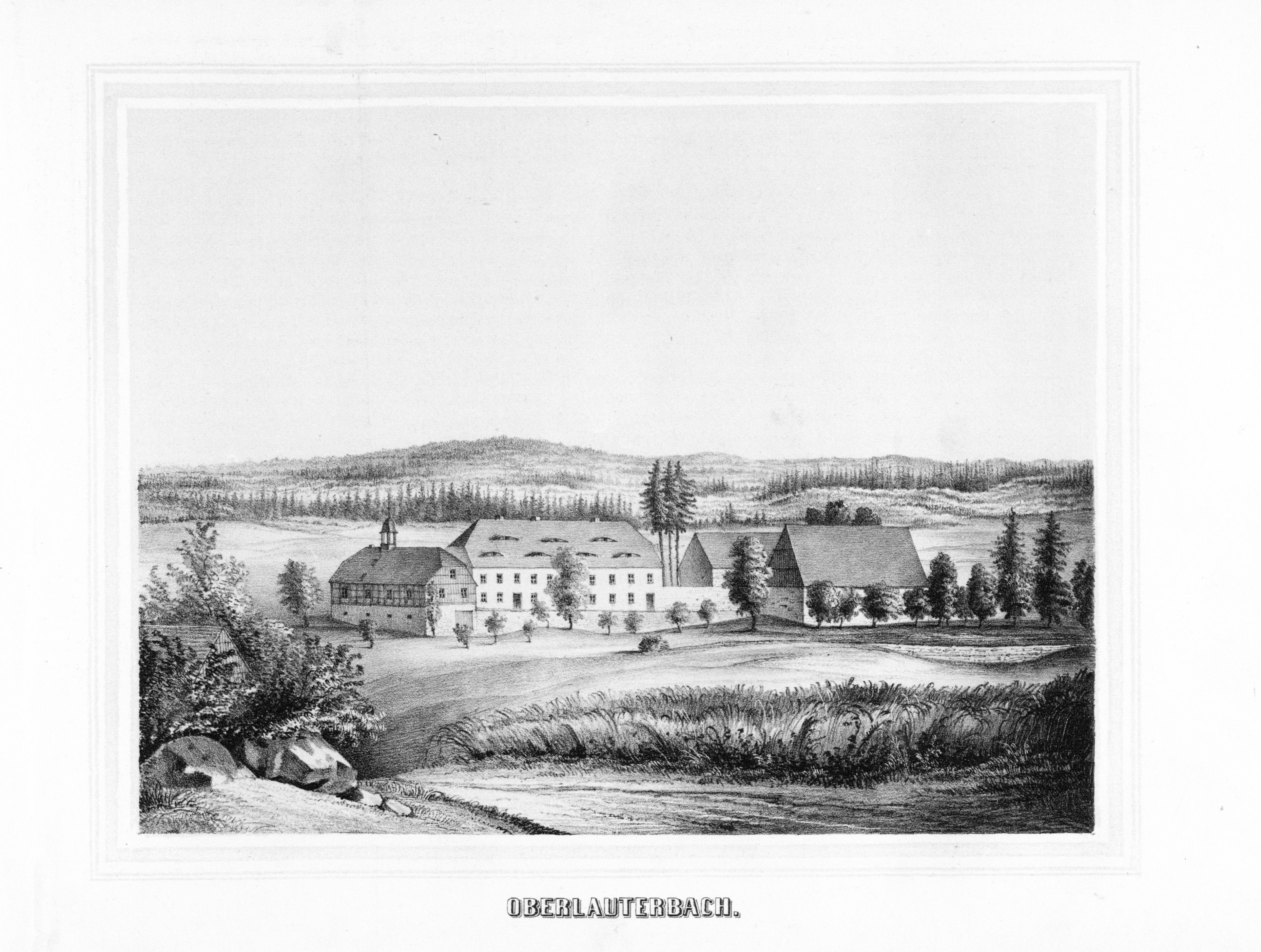 Oberlauterbach aus: Album der Rittergüter und Schlösser im Königreiche Sachsen Voigtländischer Kreis Section: V